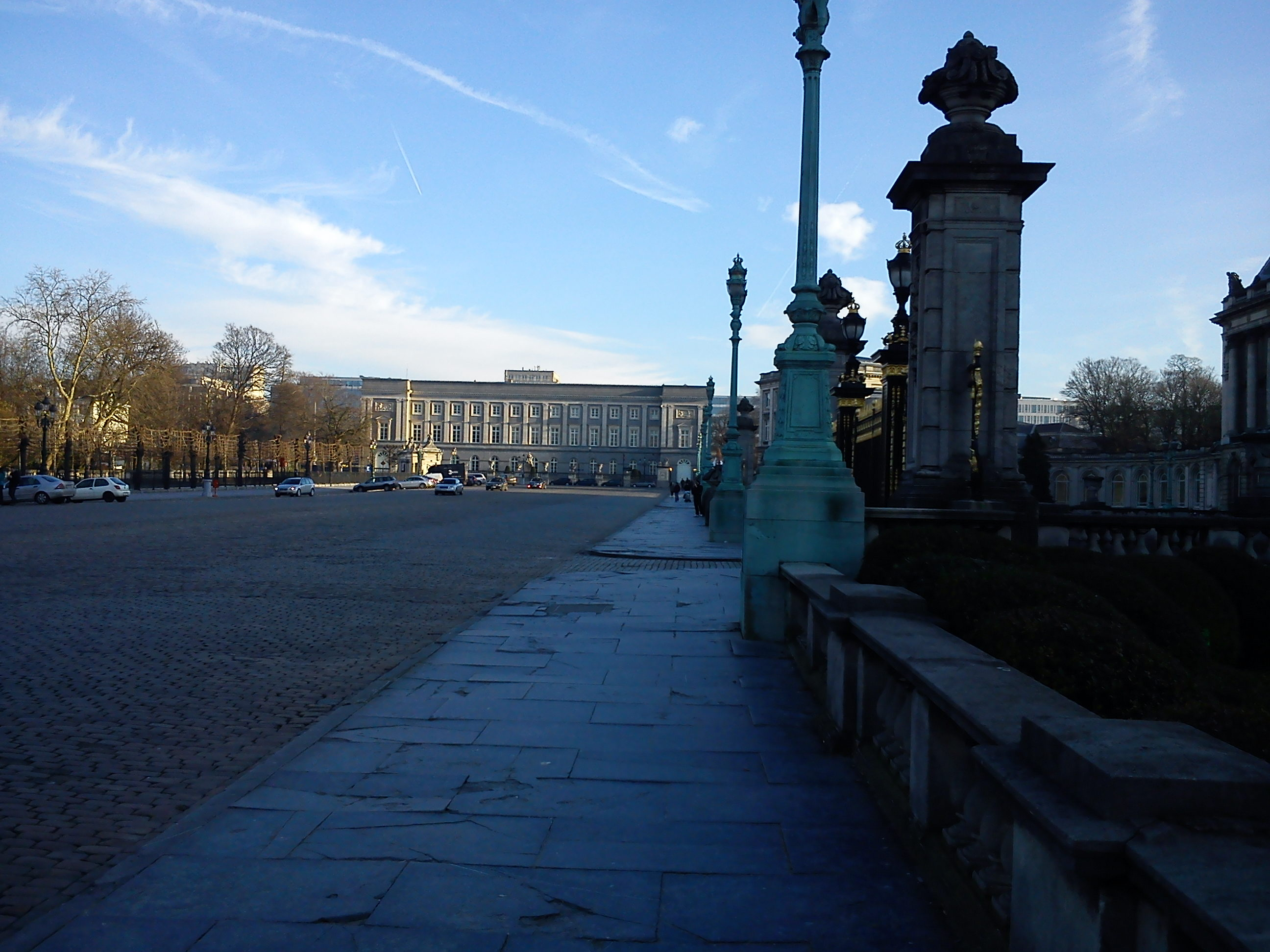 Palais des Académies, siège de l'Académie royale de Médecine de Belgique